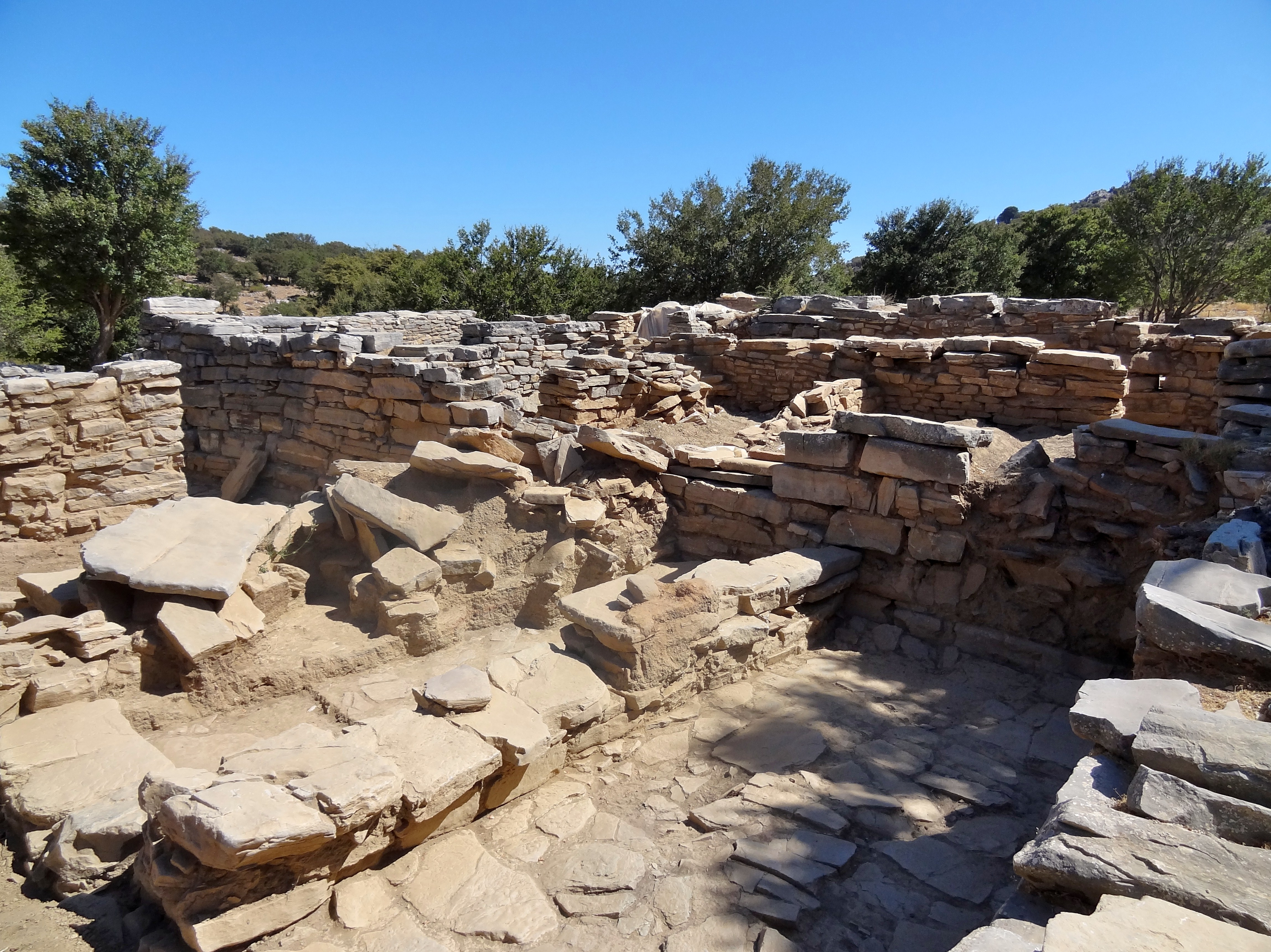 Ausgrabungsstätte von Zominthos, Gemeinde Anogia, Kreta, Griechenland